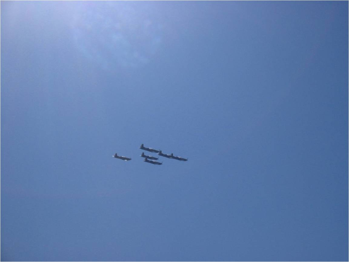 El Equipo Acrobatico del Colegio del Aire realizando el loop oblicuo